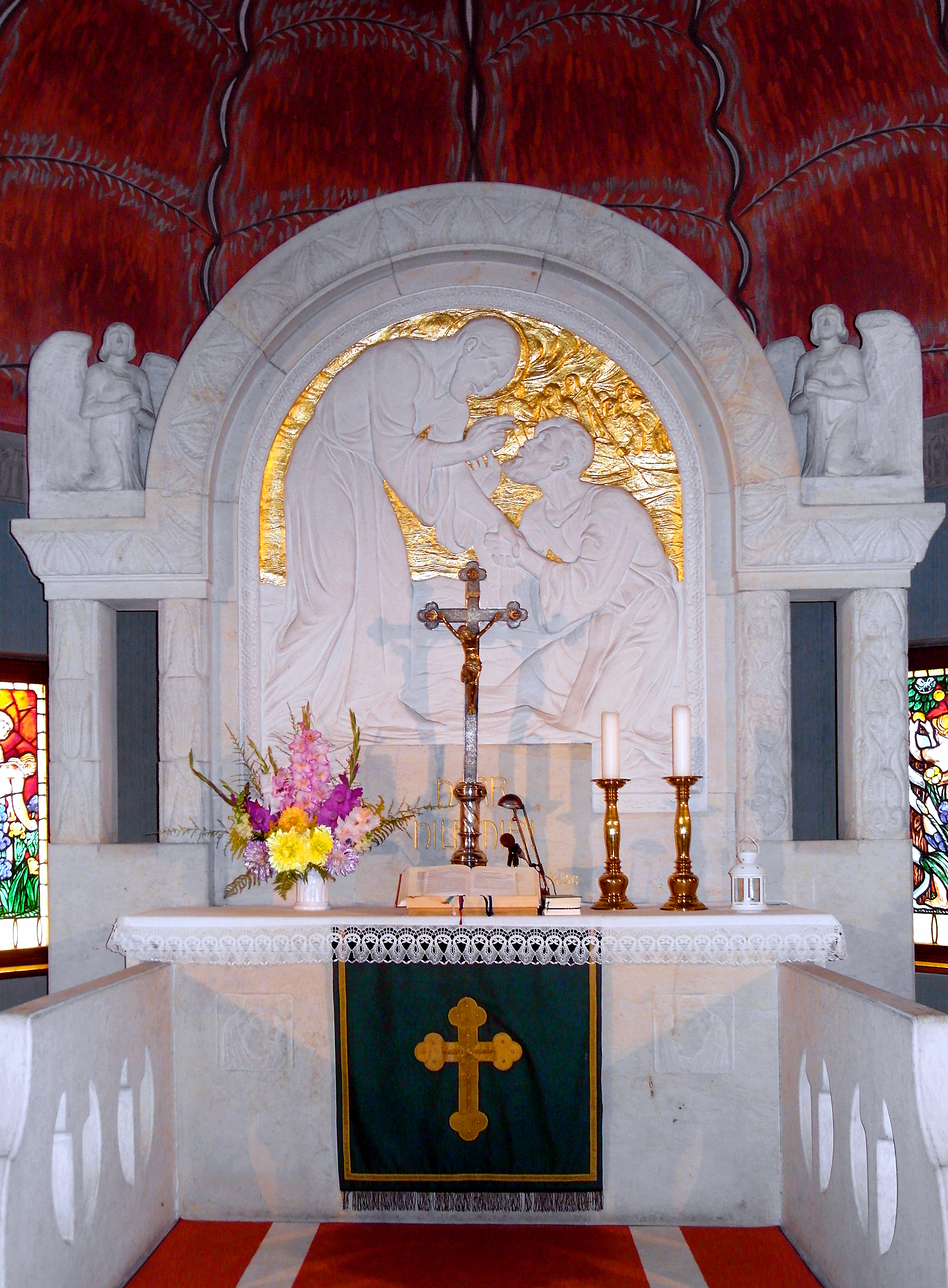 11.09.2017 09488 Wiesa (Thermalbad Wiesenbad), An der Kirche 1: (GMP: 50.611754,13.019376). St. Trinitatiskirche. Erbaut 1903/04 im Jugendstil nach Plänen von Schilling & Graebner. Den Altar schuf der Bildhauer Alexander Höfer. [SAM1881.JPG]20170911245DR.JPG(c)Blobelt